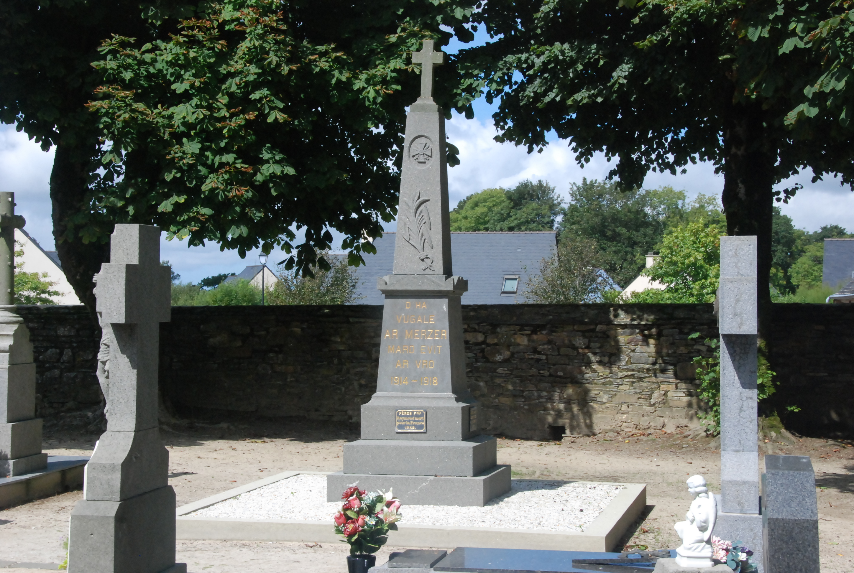 Monument aux morts - La Martyre-29